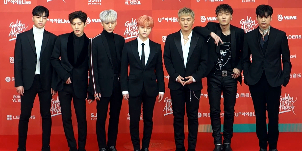 1월5일 오후 서울시 고척동 고척스카이돔에서 '제33회 골든디스크시상식' 디지털음원부문 시상식 레드카펫 행사가 열려 포토월에서 아이콘(iKON)이 포즈를 취하고 있다. #아이콘 #iKON #바비 #정찬우 #비아이 #김진환 #송윤형 #구준회 #김동혁 #골든디스크 #골든디스크어워즈 #디지털음원